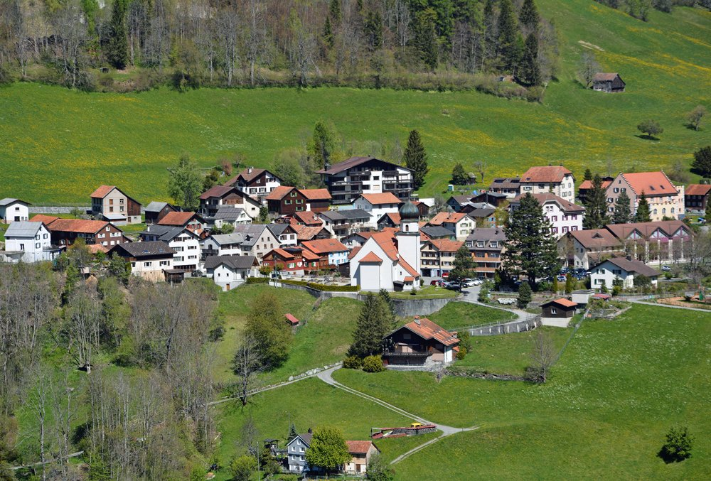 Das Dorf Valens im Taminatal